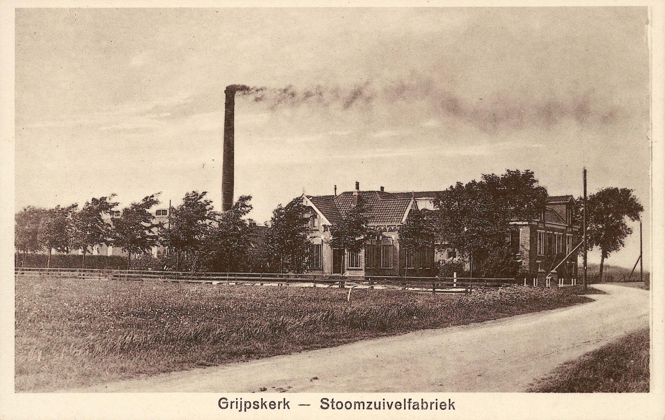 Stoomzuivelfabriek De Kievit in Grijpskerk